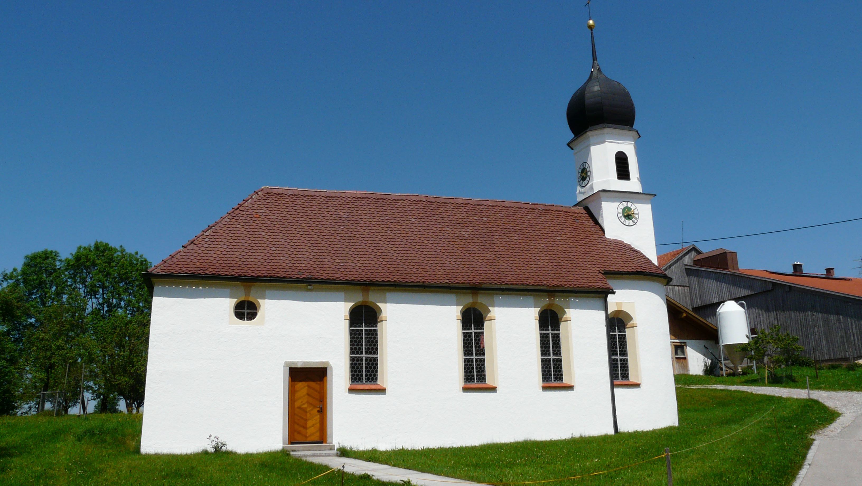 Kapelle in Stadels, Görisried